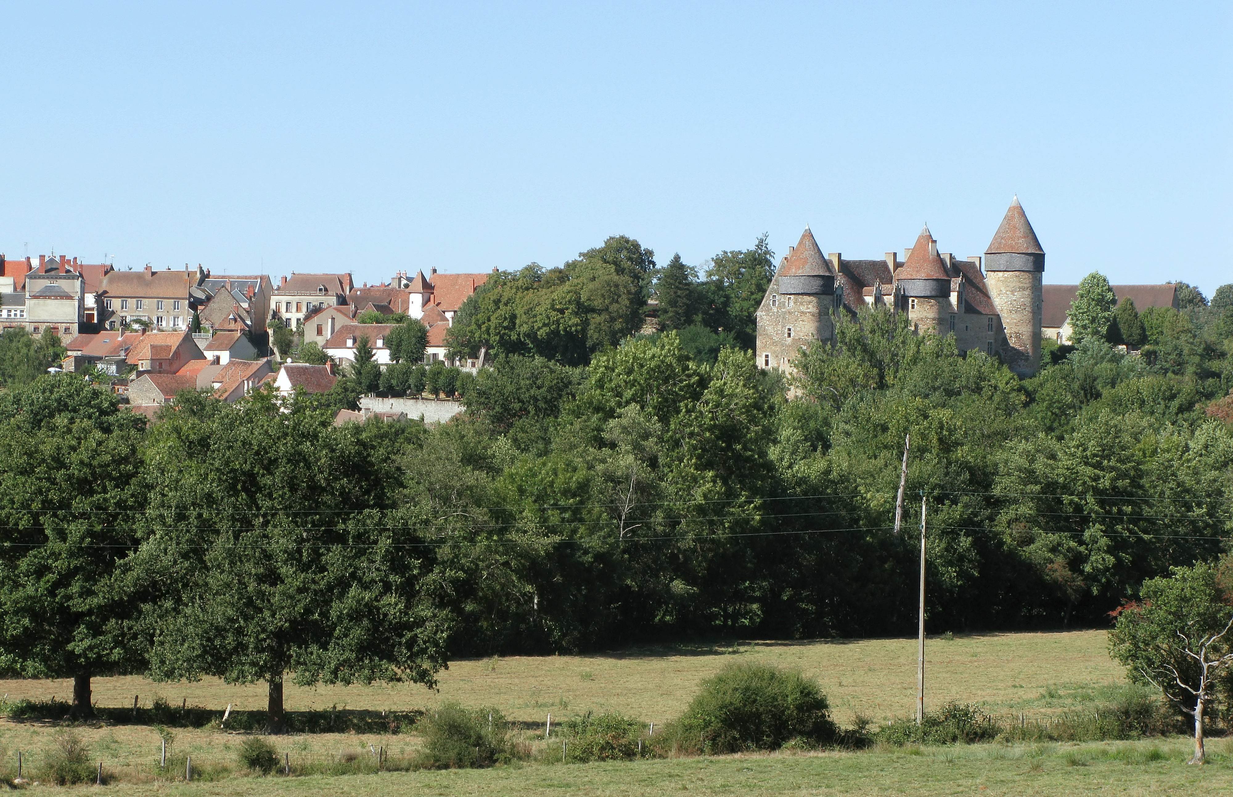 Ortschaft und Schloss Culan im französischen Département Cher